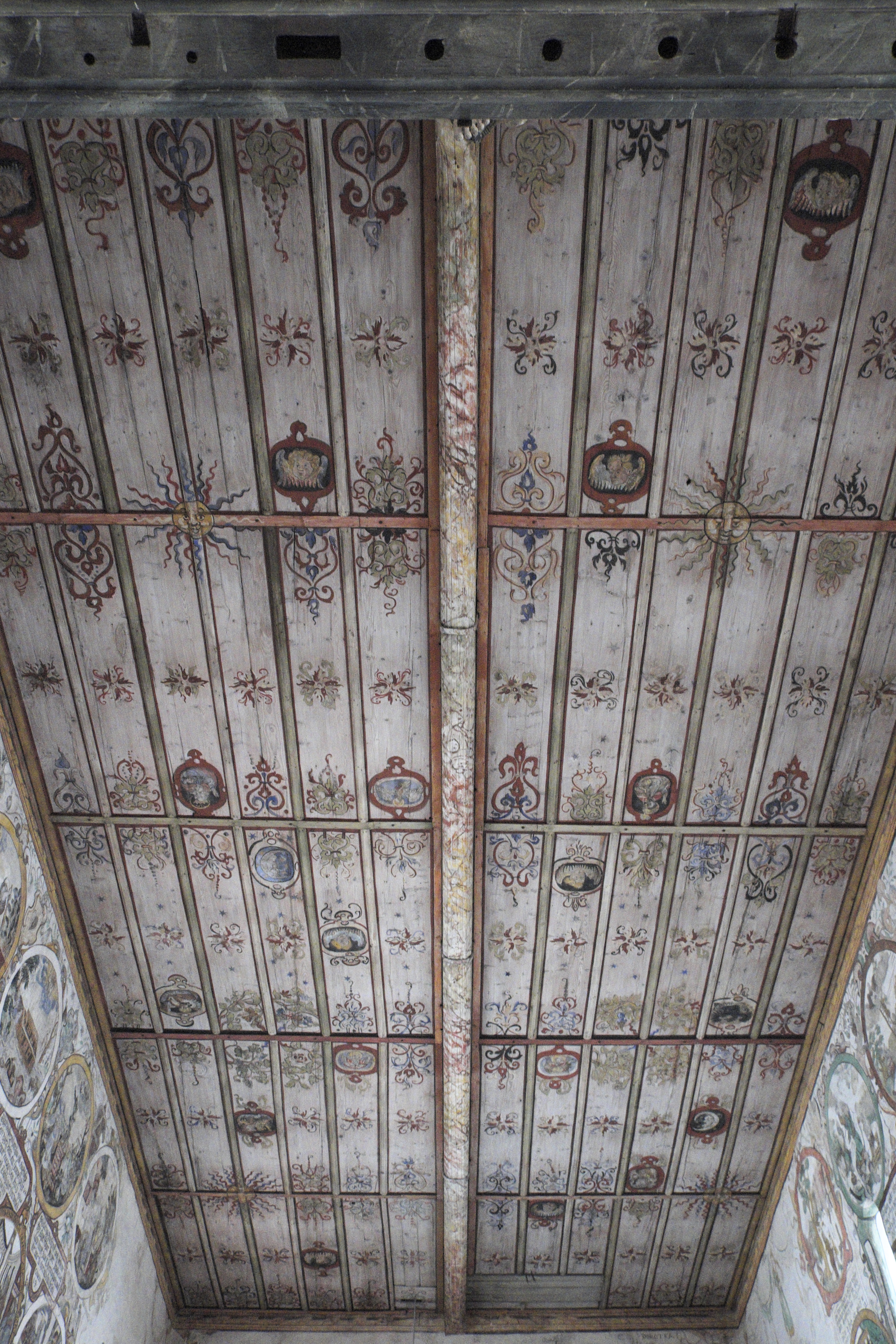 Katholische Martinskapelle in Bürgstadt im Landkreis Miltenberg (Unterfranken/Bayern), Langhausdecke mit Malereien von Andreas Herneisen aus dem Jahr 1589